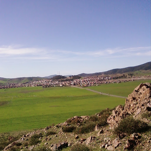 Aguelmous